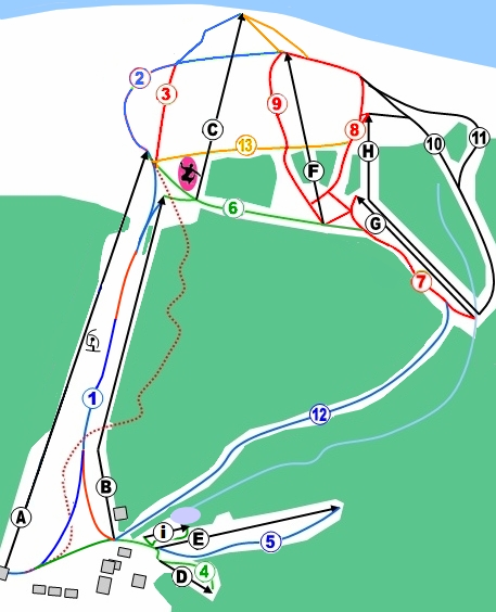 plan schématique du domaine skiable de Chalmazel